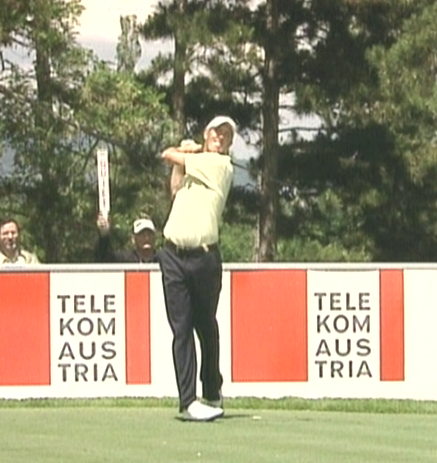 Bildbeschreibung: Richard Green bei den Austrian Open 2006 Quelle: eigene Aufnahme mit einer Handycam Datum: Juni 2006 Autor: Boss 14:35, 27 June 2006 (UTC) Lizenz: GNU